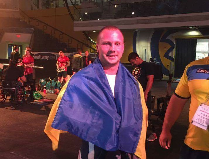 Капітан ЗС України Василь Пашкевич виборов золоту медаль з пауерліфтингу